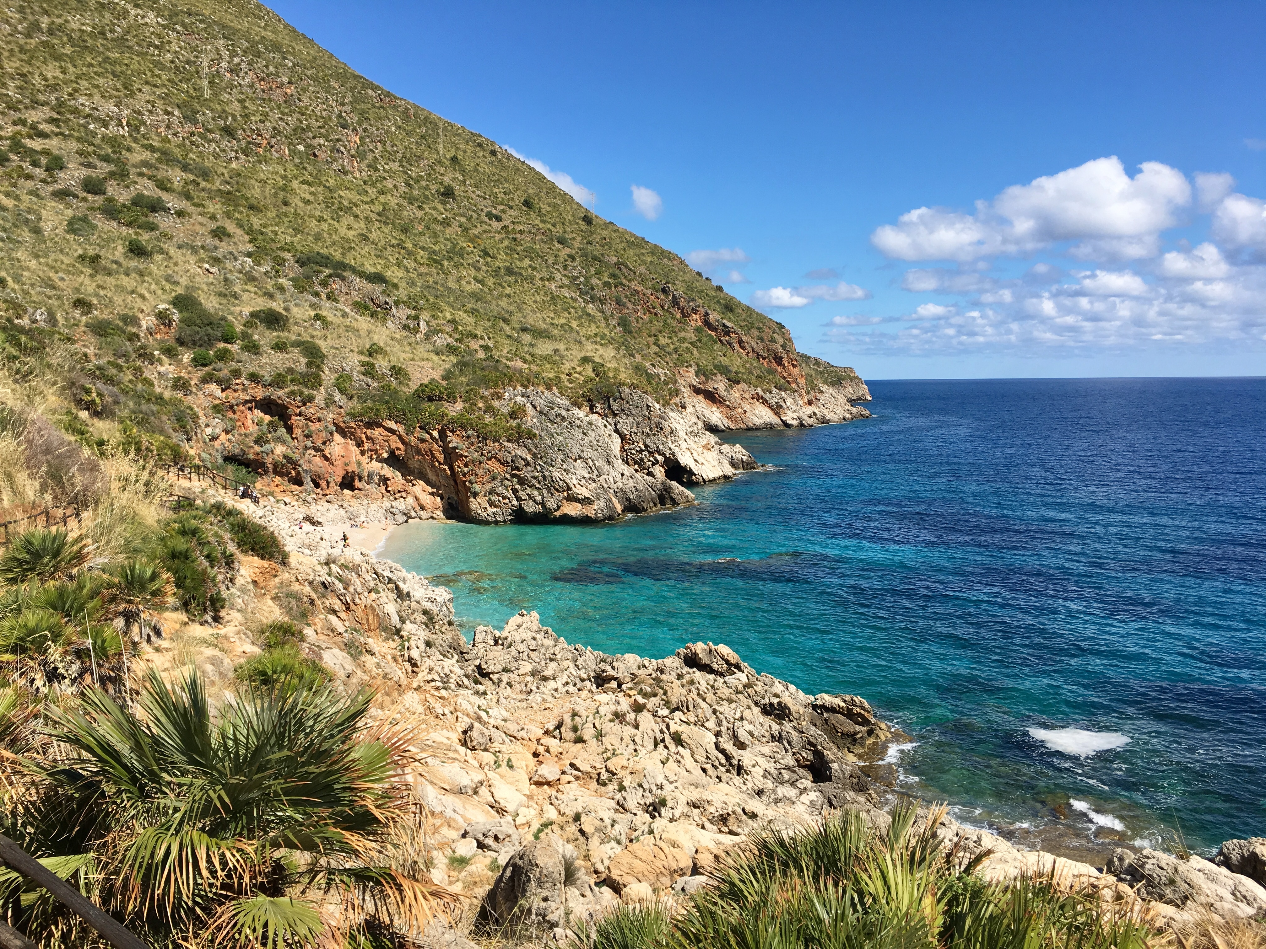 Riserva naturale orientata dello Zingaro (Q1435077)